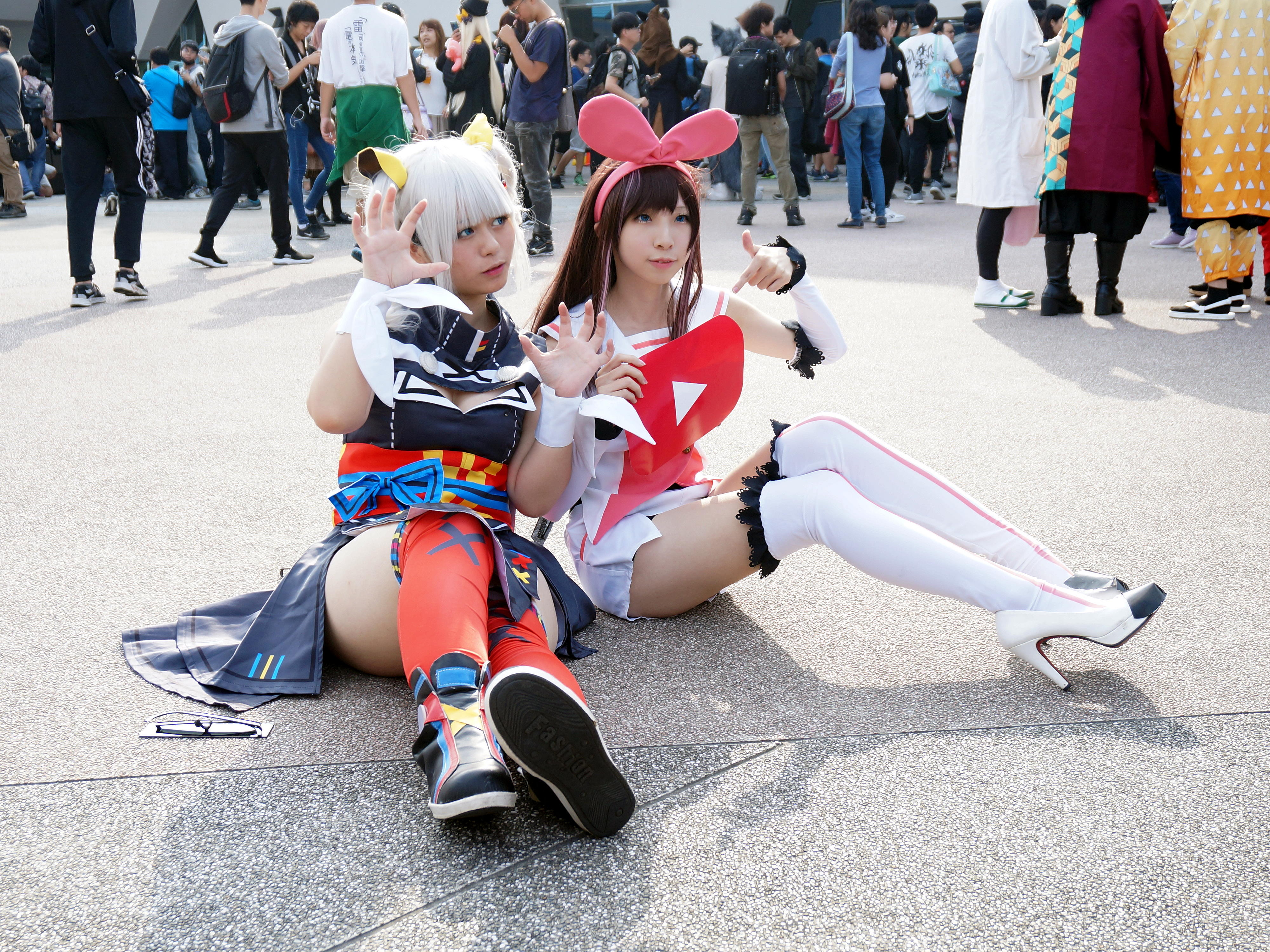 中文（台灣）: 第10屆台灣原創嘉年華，熙莫（左）cosplay輝夜月，雪依（右）cosplay絆愛。